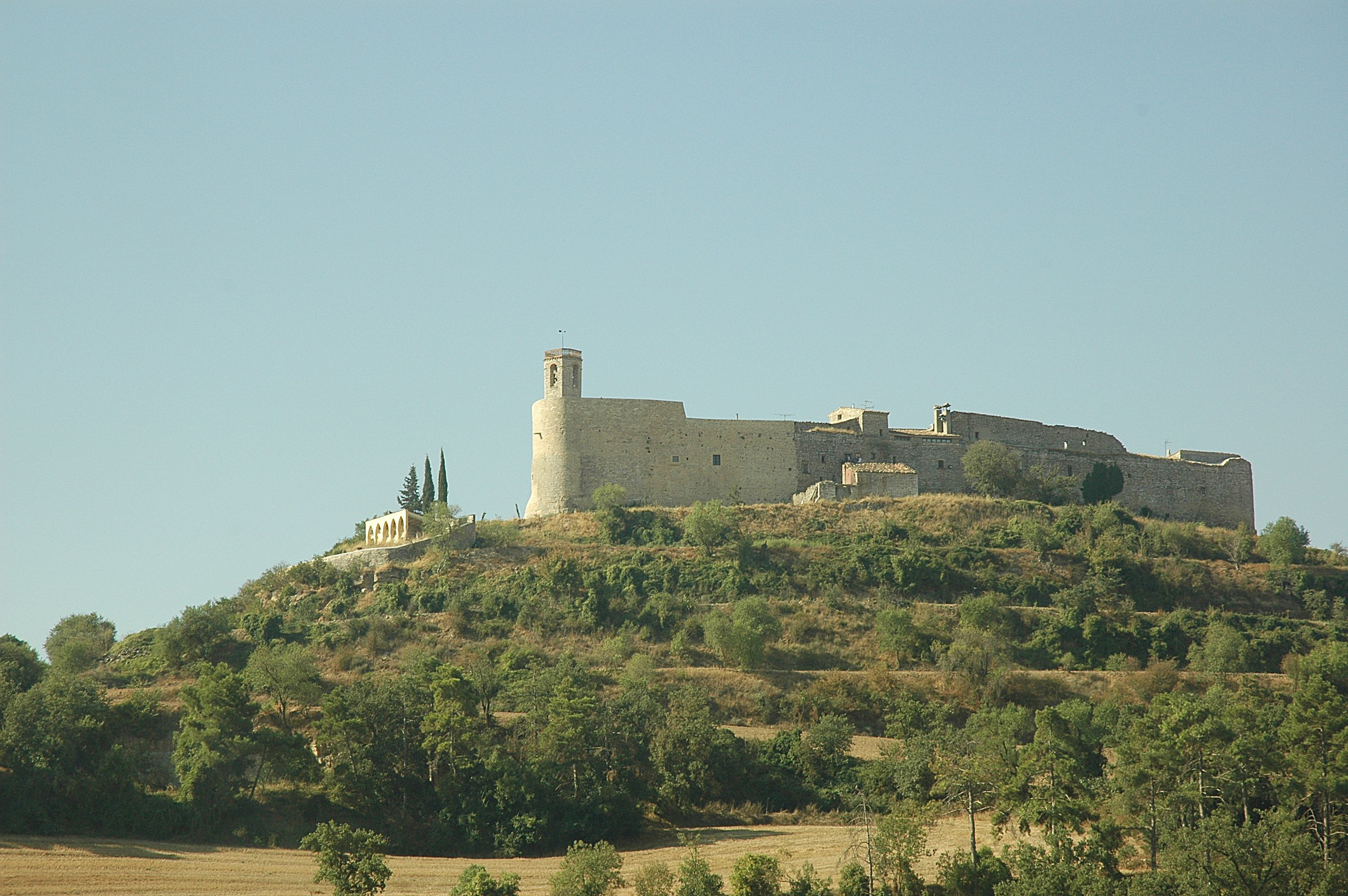 Montfalcó Murallat